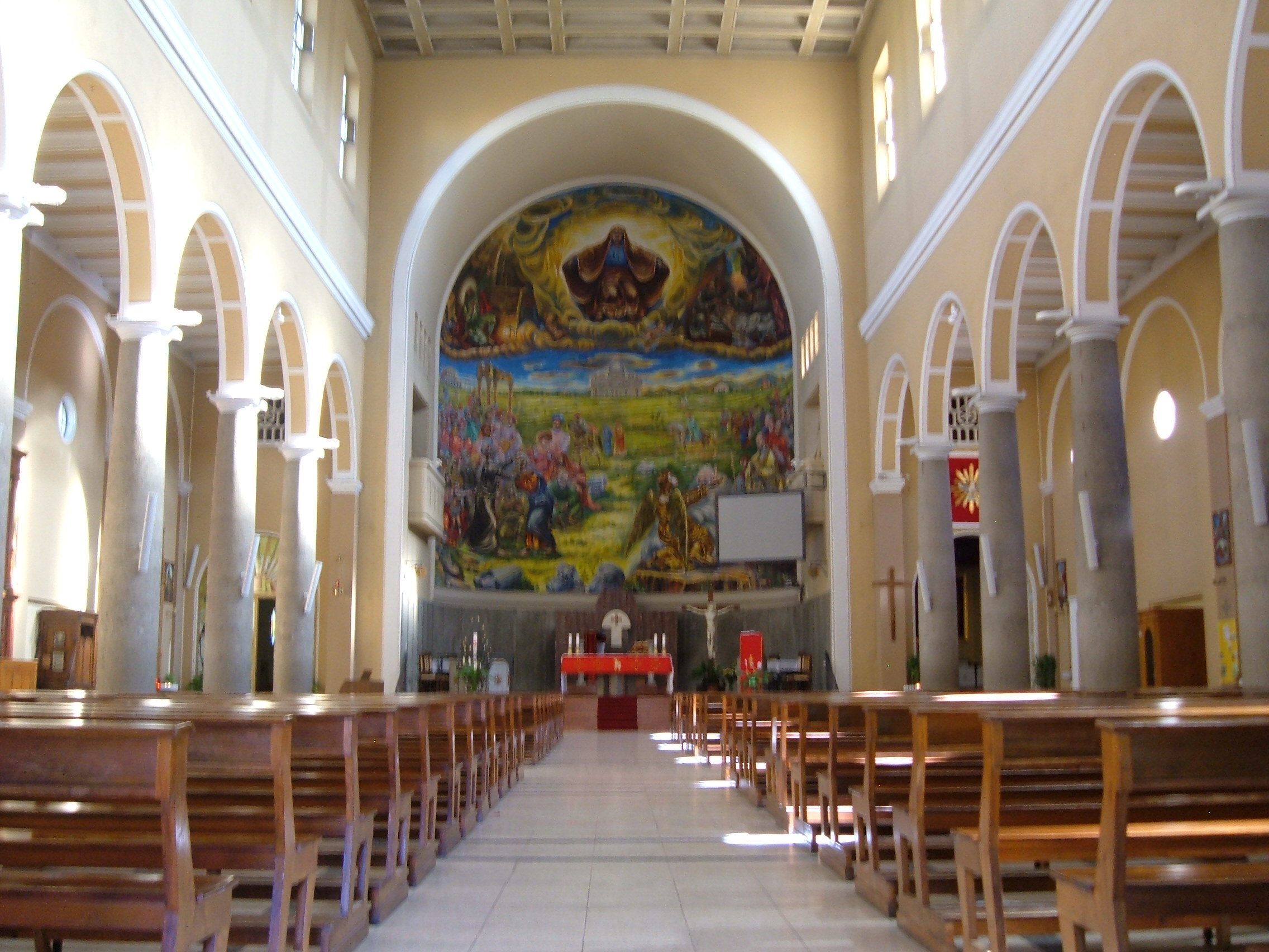 Interno della chiesa di san Filippo Neri in Eurosia a Roma, nel quartiere Ostiense, in via delle Sette Chiese.